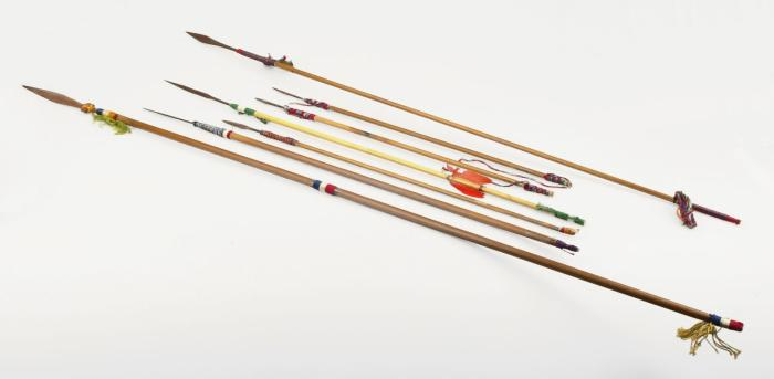 Pijl (onderdeel). Zevental pijlen voor de jacht op bosvarkens, met rieten schacht en houten punt Unknown language: Purïlwa potïrï